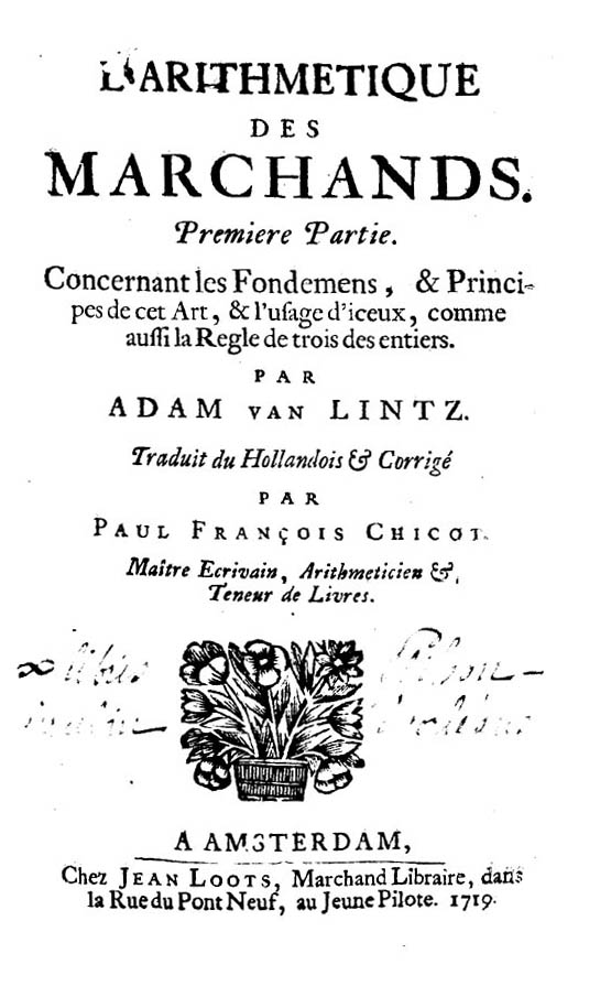 1. partie. Concernant les fondemens, & principes de cet art, & l'usage d'iceux, comme aussi la regle de trois des entiers. - A Amsterdam : chez Jean Loots marchand libraire dans la rue du Pont Neuf, au Jeune Pilote, 1719. - 128 p. ; 16 cm .